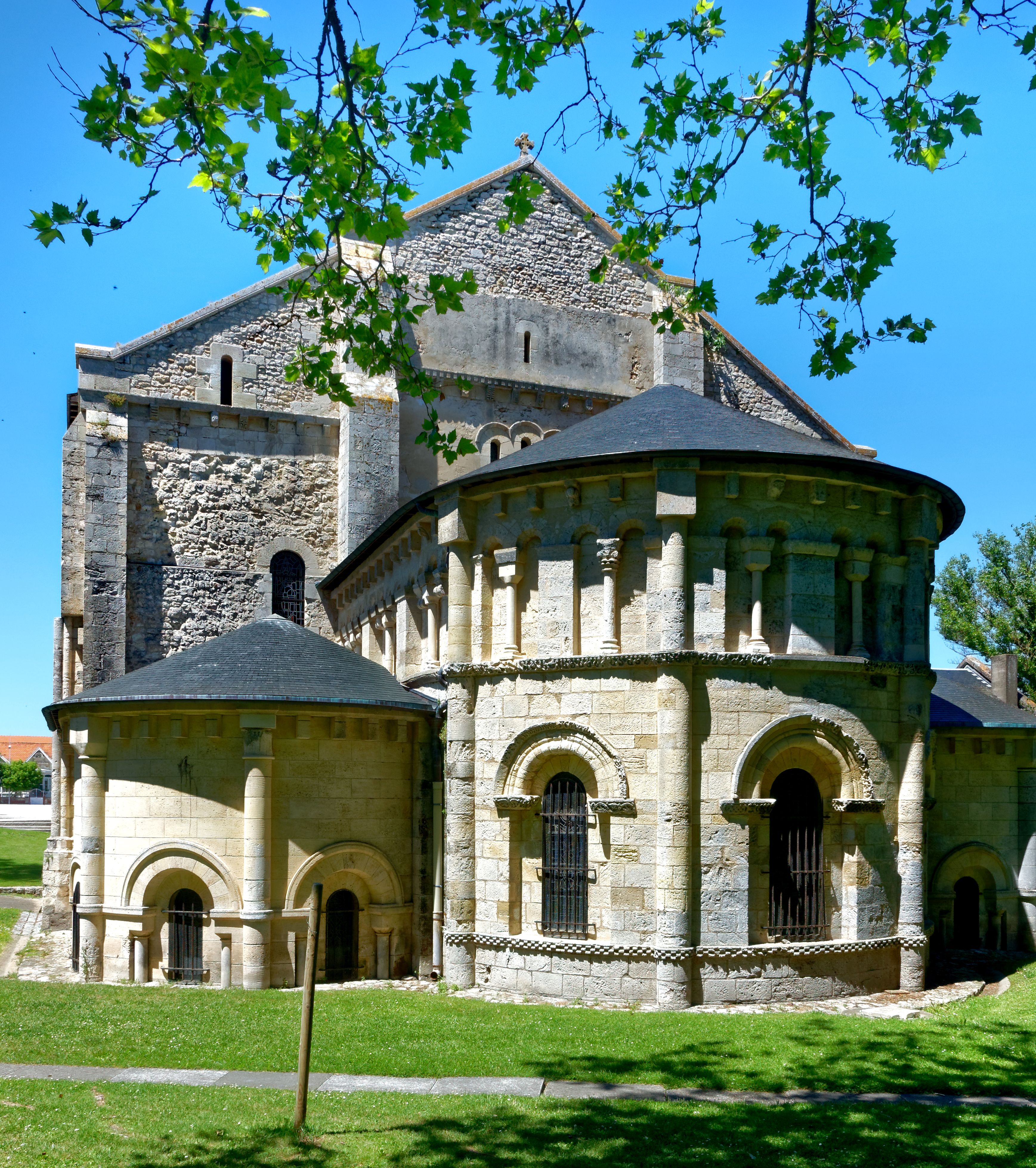 Die romanische Kirche Soulac wurde im 12. Jahrhunder erbaut.